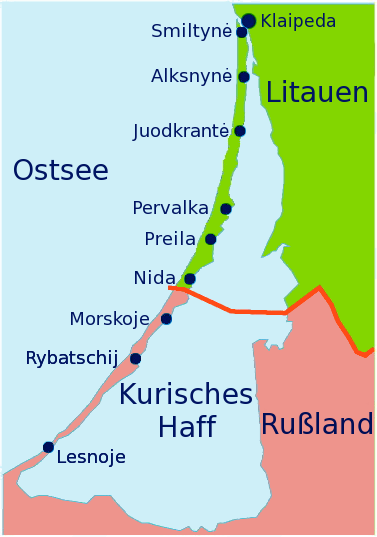 Karte der Kurischen Nehrung.